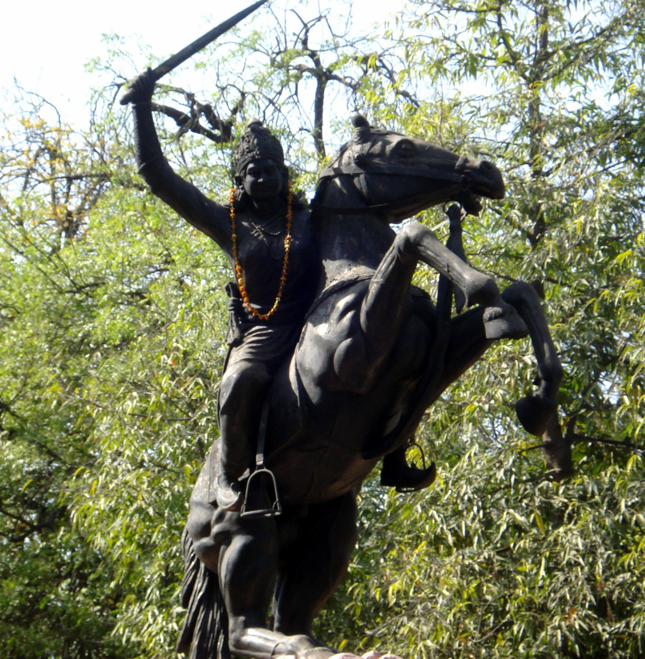 Statue of Jhalkaribai at Gwalior, Madhya Pradesh.